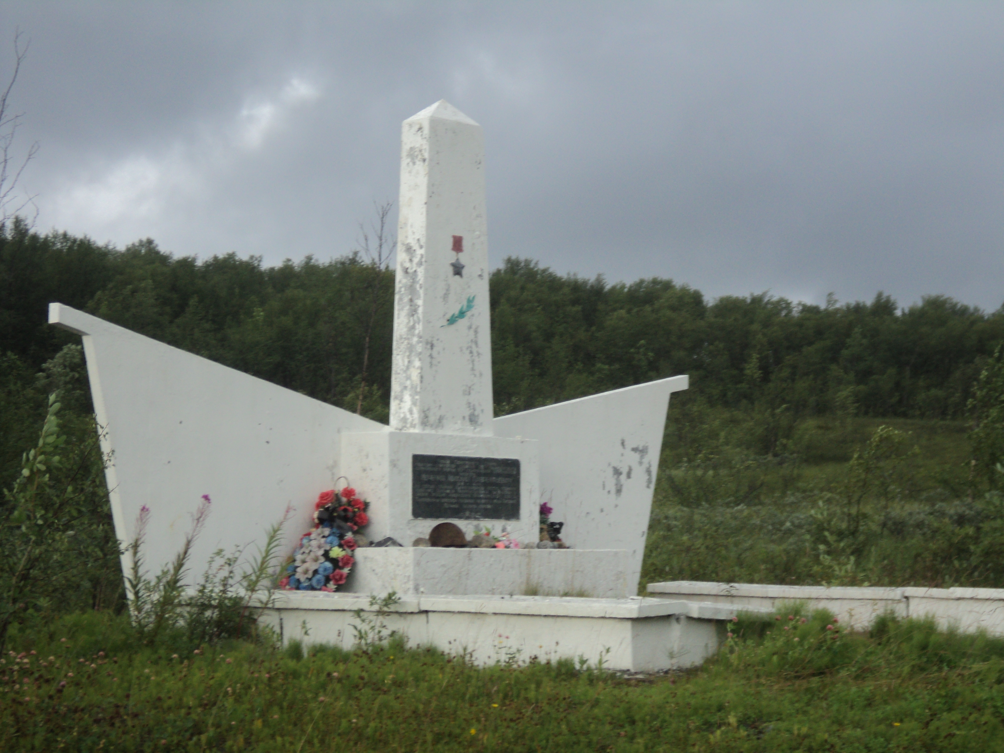 Памятник М. Л. Ивченко на трассе Кола - ПеченгаНадпись на табличке: Герой Советского Союза гвардии — ефрейтор, снайпер 28го гвардейского стрелкового полка 10й гвардейской стрелковой дивизии Ивченко Михаил Лаврентьевич 1918—1944 На сопке «Малый Кариклайвишь» место подвига Ивченко Михаила Лаврентьевича, закрывшего своей грудью амбразуру вражеского дзота. Похоронен на братском кладбище на берегу реки Титовка. Вечная память героям!